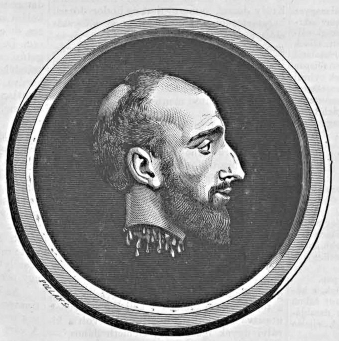 Martinovics Ignác. Pollák Zsigmond metszete (Vasárnapi Ujság, 1869. február 14.)